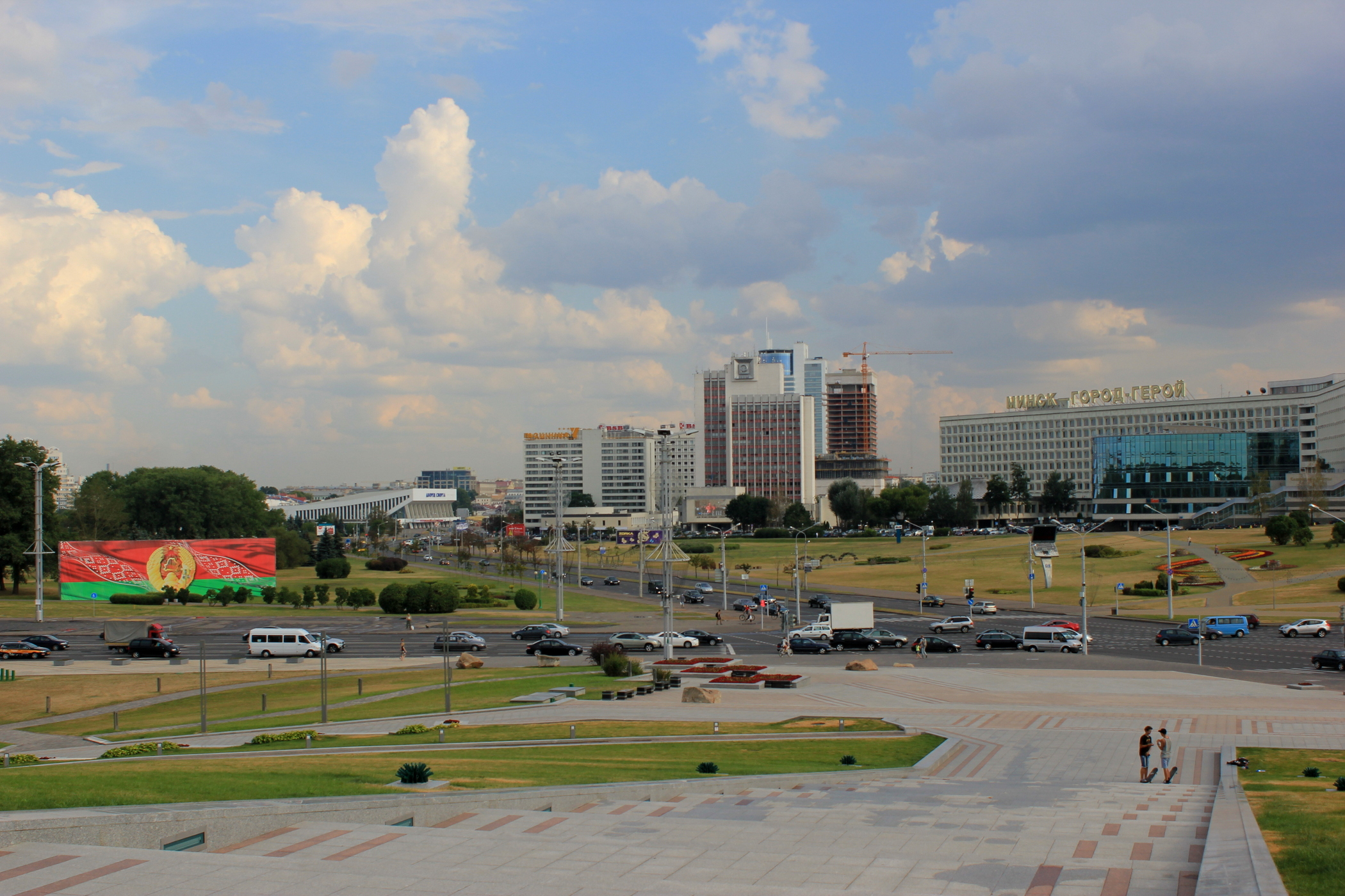 Minsk; Blick vom Museum des Großen Vaterländischen Krieges auf den Mašerawo-Prospekt mit Tribüne für Paraden.